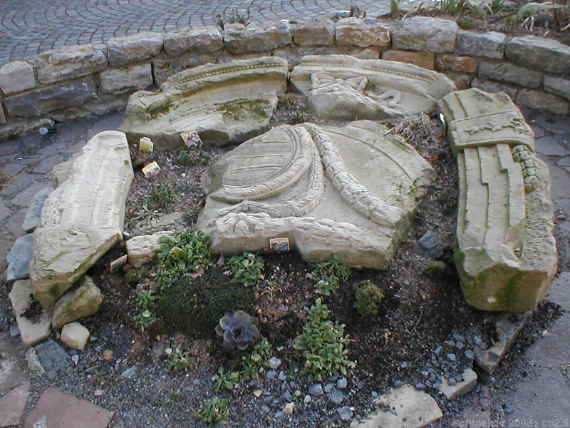 Fragmente vom Portal des einstigen Unteren Schlosses in Bad Rappenau-Bonfeld, heute Teil einer Gartengestaltung im nahen Eichhäuser Hof